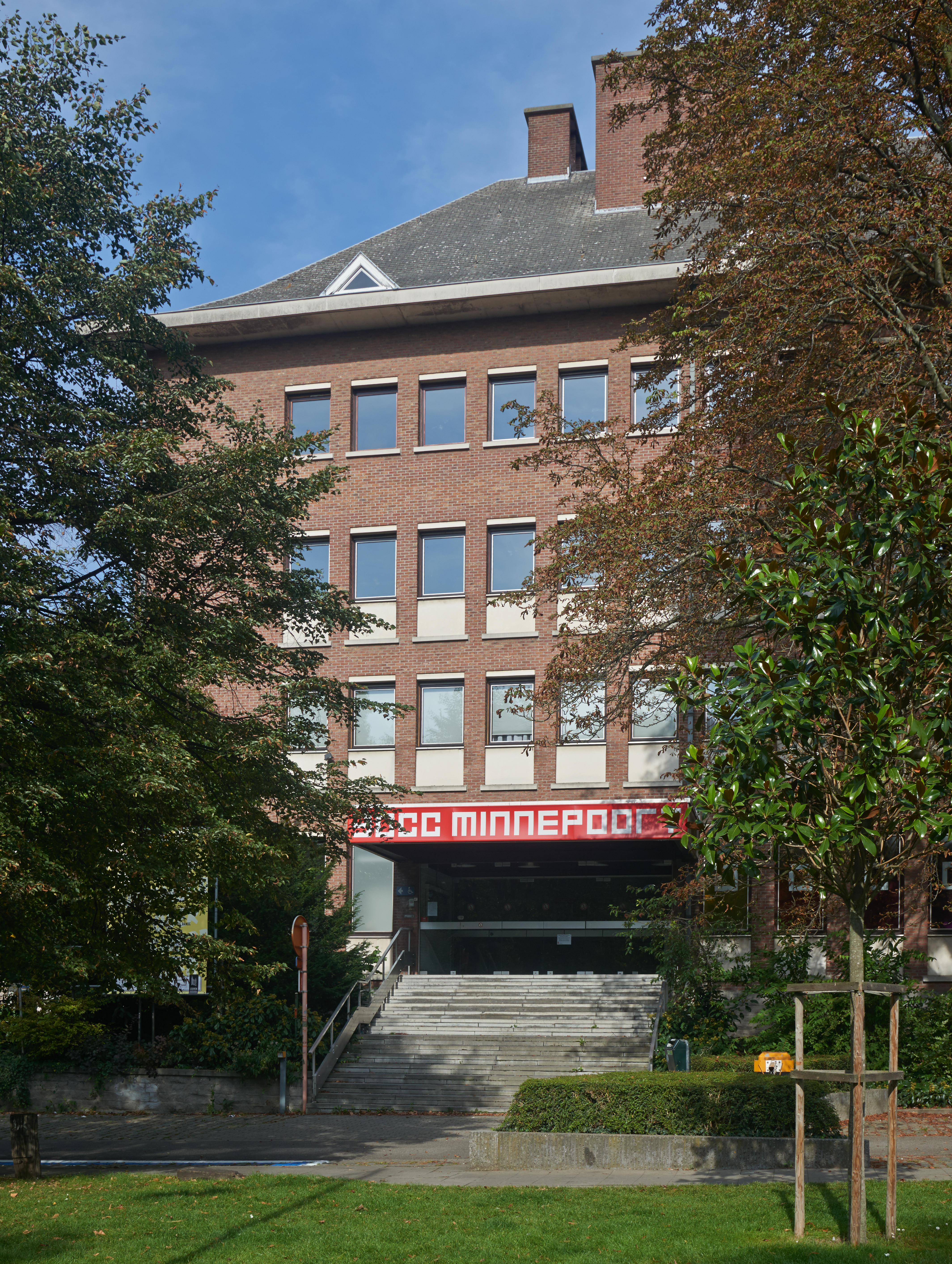 Leuven, Dirk Boutslaan 62, Minnepoort